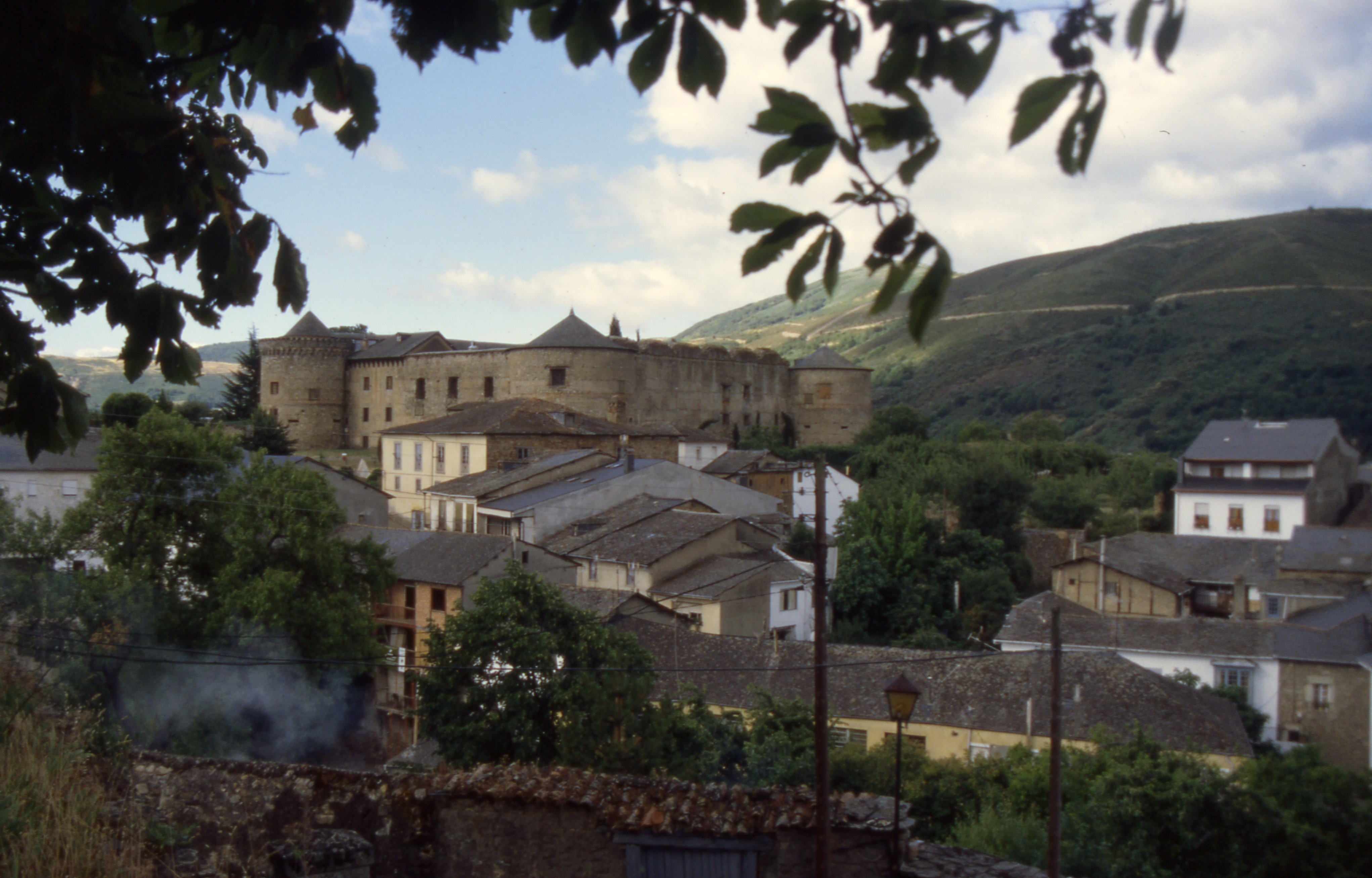 VillafrancaDelBierzoAnsicht